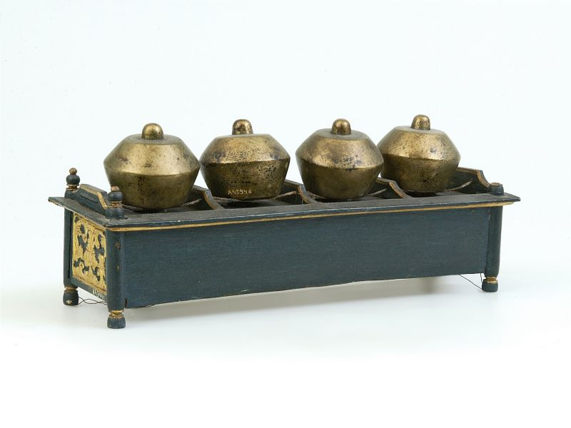 Model. Behoort tot een model van een gamelan-slèndro, bestaande uit 39 stukken.. Model van een gong van koper, hangend in een frame, onderdeel van een gamelan-orkest Unknown language: Kenong